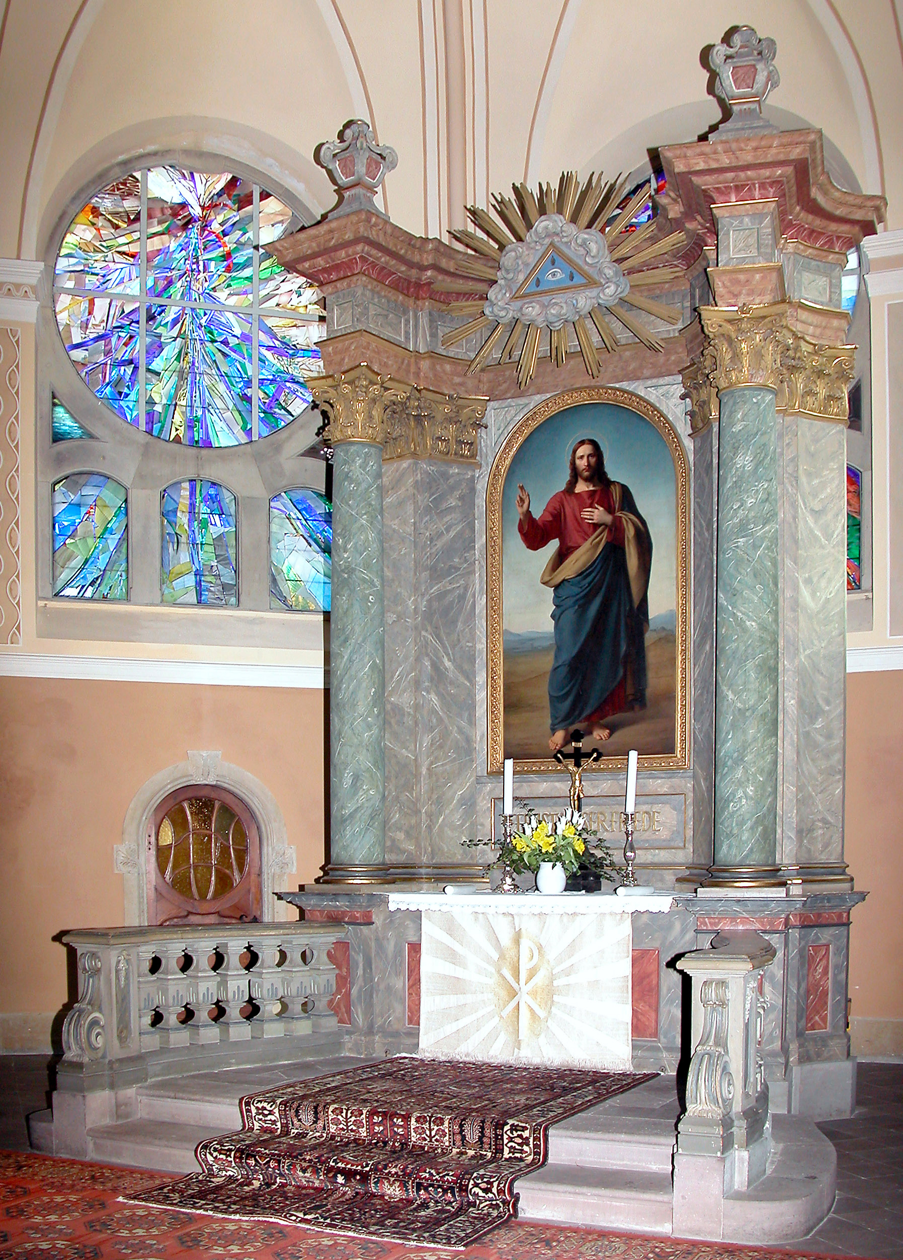 31.03.2005 01187 Dresden-Altplauen, Reckestraße 6 (GMP: 51.028935,13.704658): Ev.-Luth. Auferstehungskirche. 700jährige Vorgeschichte mit vielen Umbauten. Früher hieß sie Michaeliskirche. Nach dem letzten großen Erweiterungsbau erhielt sie 1903 den Namen Auferstehungskirche. Architekten waren William Lossow und Hermann Viehweger. Die Glasfenster im Alttarraum schuf der Dresdner Wolfgang Korn 2000 bis 2003 neu. [DSCN6160.TIF]20050331086DR.JPG(c)Blobelt